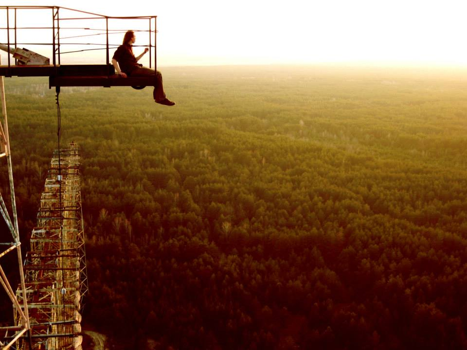 Маркіян на вершині "Російського дятла" (ЗГРЛС Дуга)